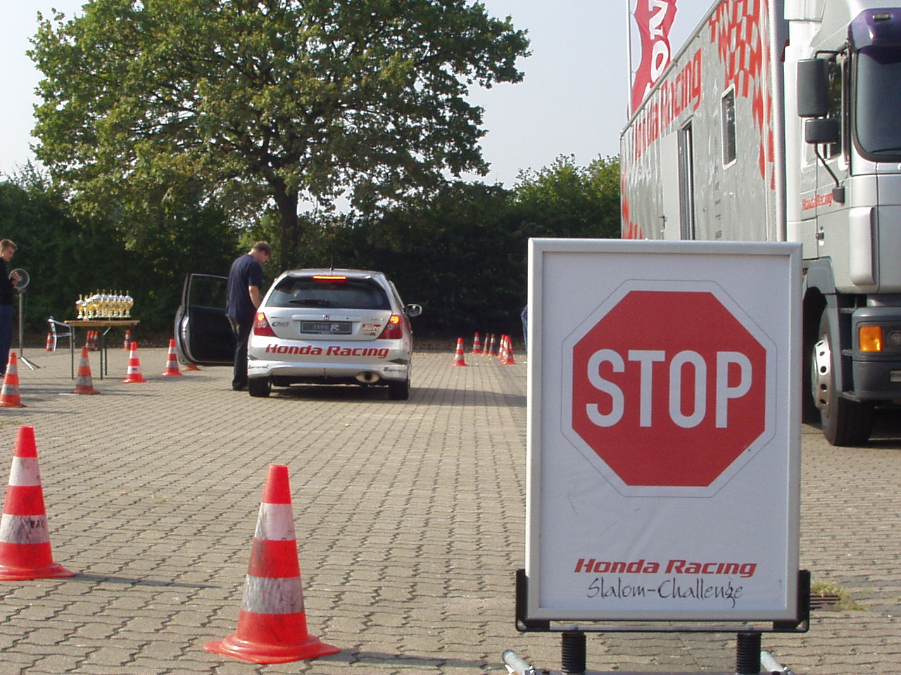 "Boxengasse"